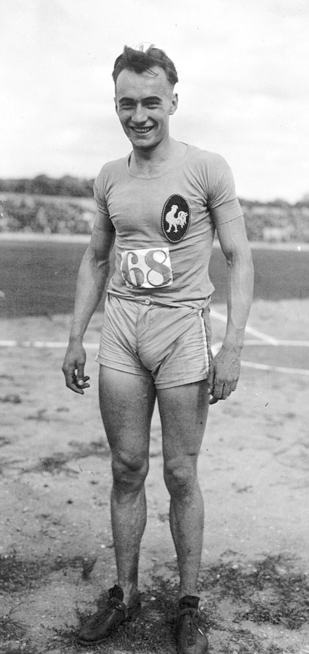 Stade Pershing, match athlétisme France-Angleterre : Sempé, portrait à 2 m 50 : [photographie de presse] / Agence Meurisse